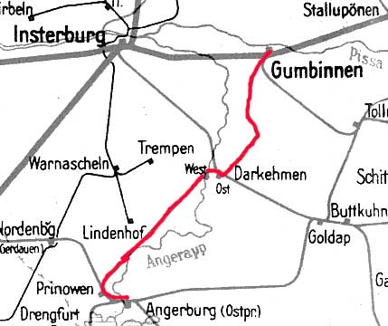 Angerburg-Gumbinnen 1938